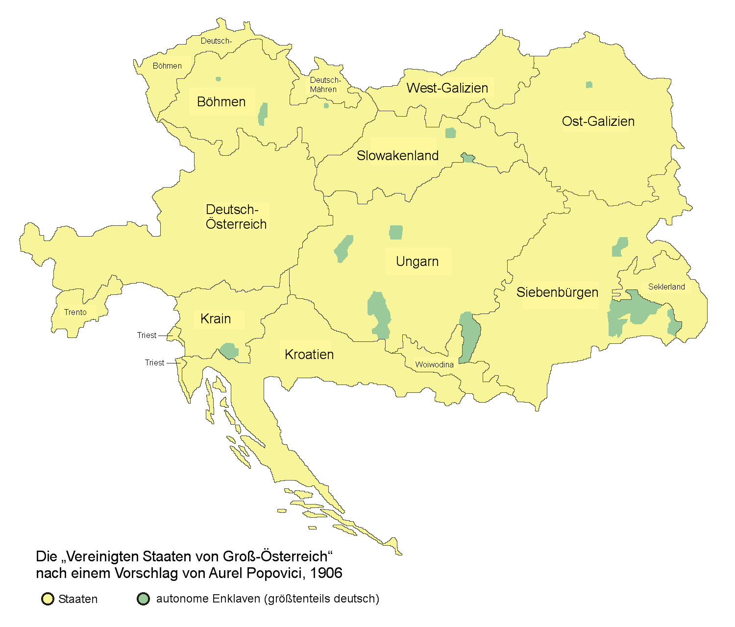 vorgeschlagene Gliederung der Vereinigten Staaten von Groß-Österreich, 1906